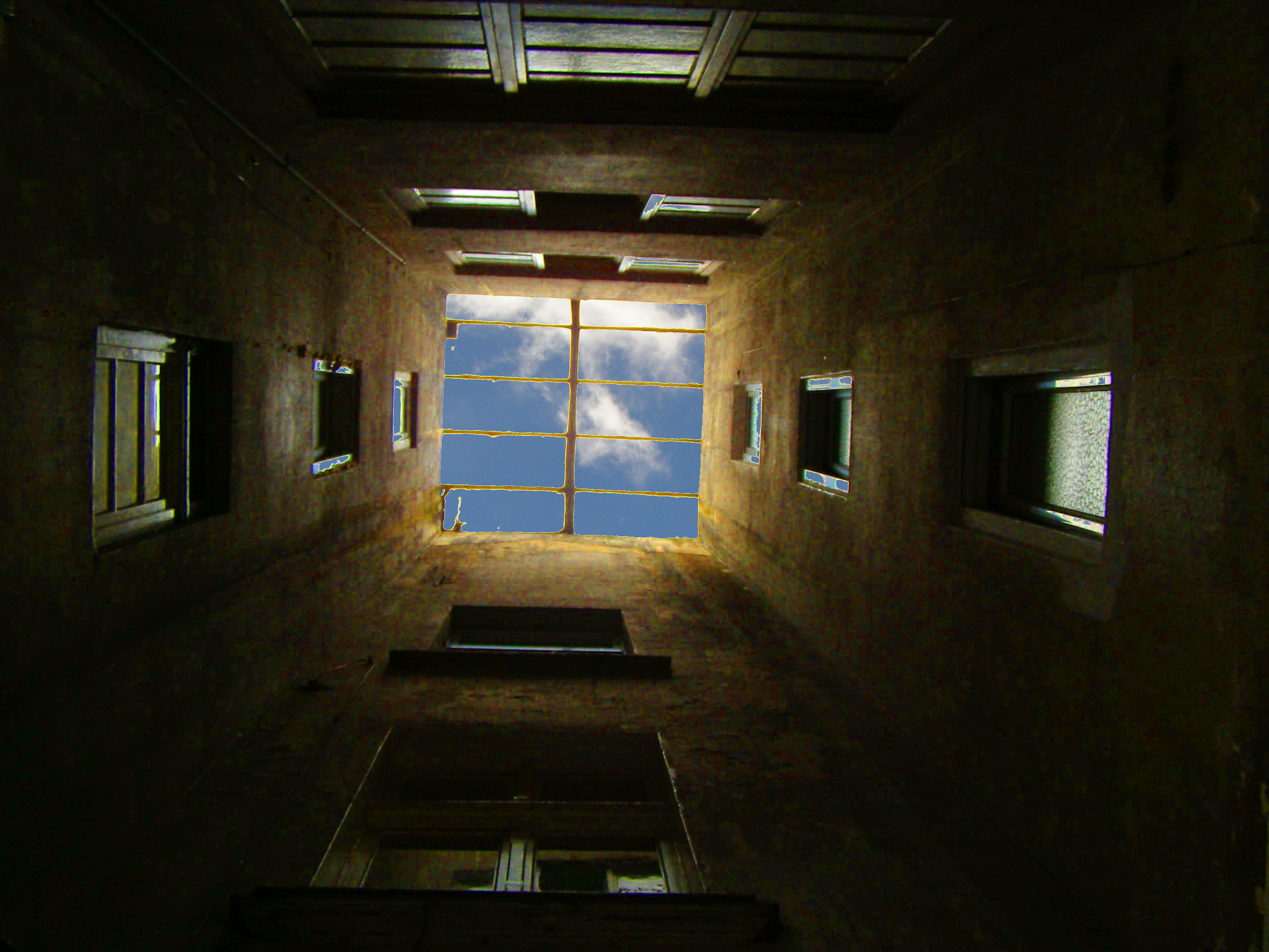 Heaven Above #3